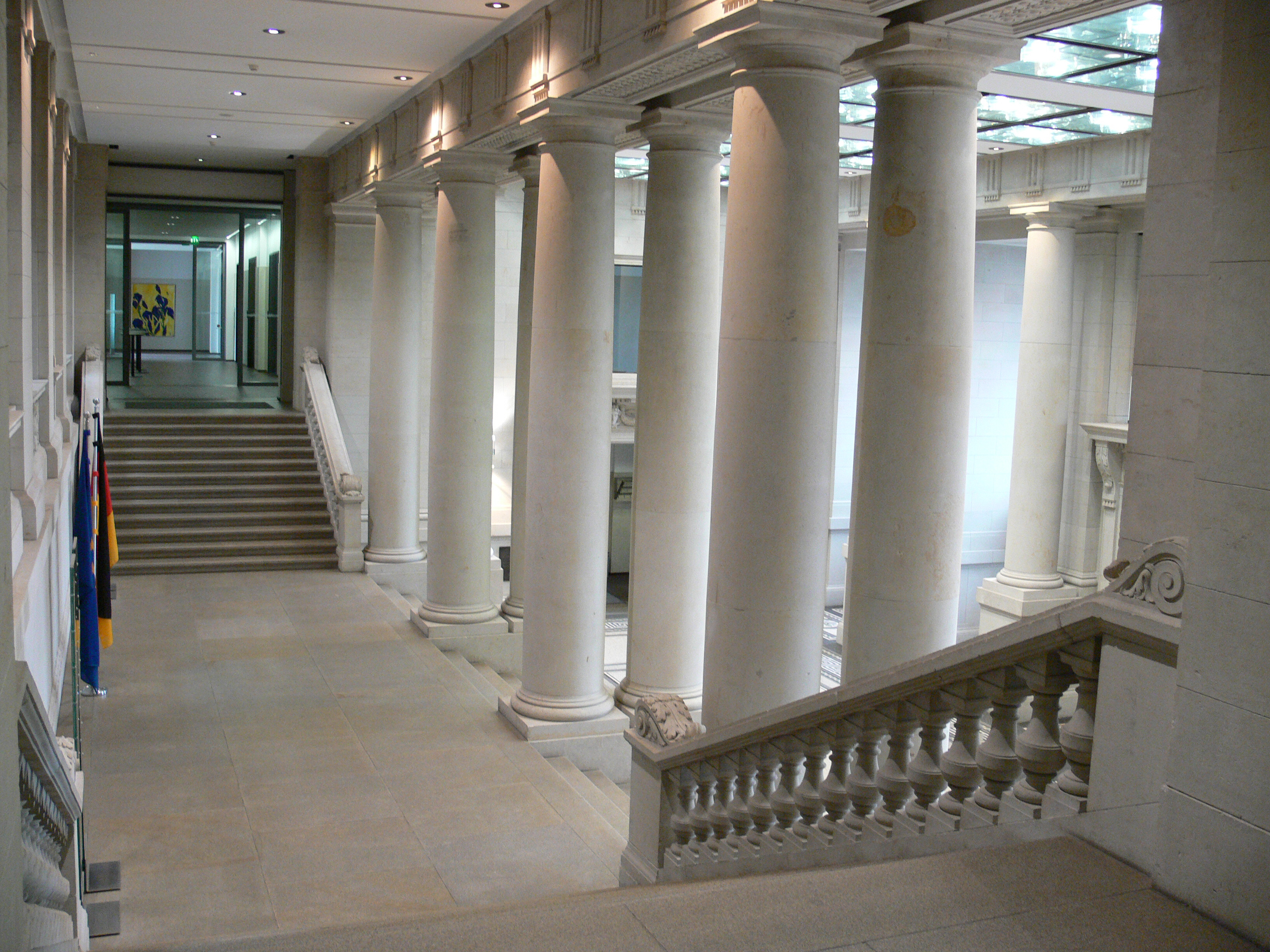 Eingangshalle. Ehemaliges Preußisches Herrenhaus; Sitz des Bundesrats der Bundesrepublik Deutschland; Leipziger Straße, Berlin